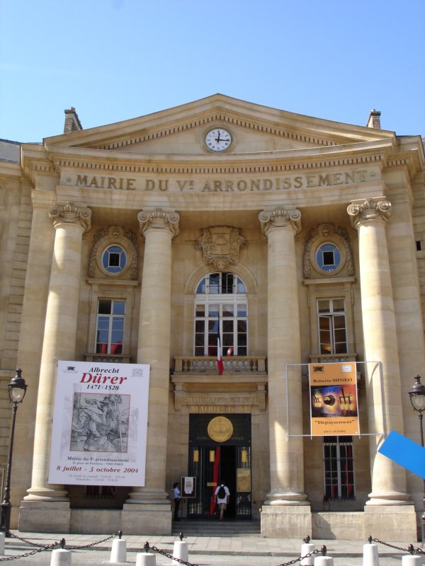 Façade de la mairie du Ve arrondissement (Paris), prise pendant l'exposition Dürer. L'objet bleu sur la droite est une sculpture contemporaine non identifiée.